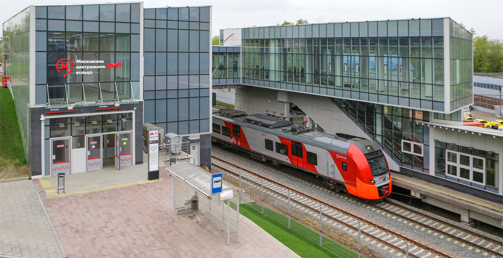 Платформа МЦК Крымская и электропоезд ЭС2Г